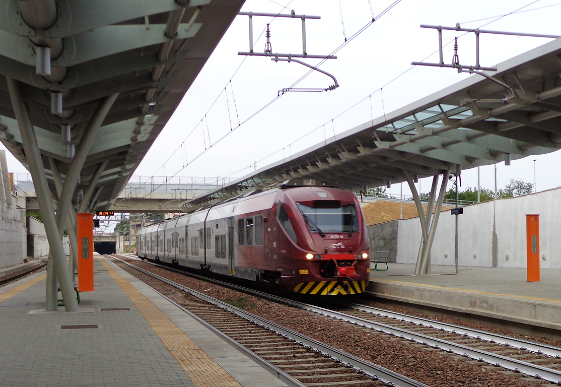 Stazione ferroviaria di Castellanza, treno Malpensa Express in sosta.